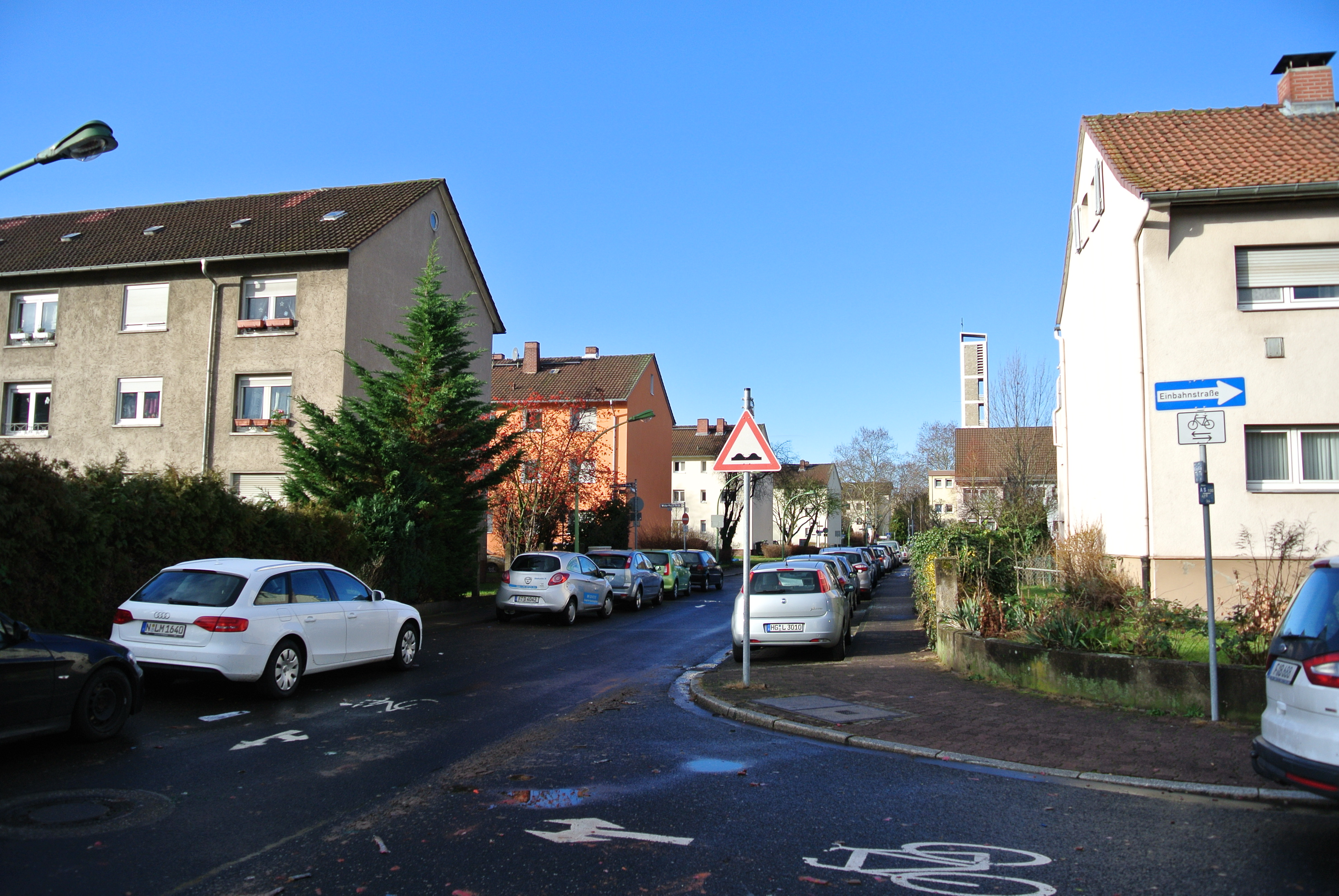 Kuhwaldsiedlung in Frankfurt-Bockenheim; Funckstraße; Zeilenbauten der 1950er Jahre